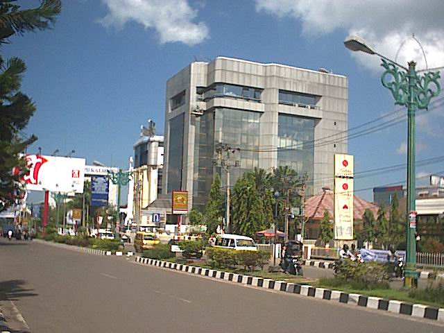 Summary De Lambung Mangkurat-straat in Banjarmasin. Overgenomen uit de Indonesische Wikipedia (publiek domein). Licensing